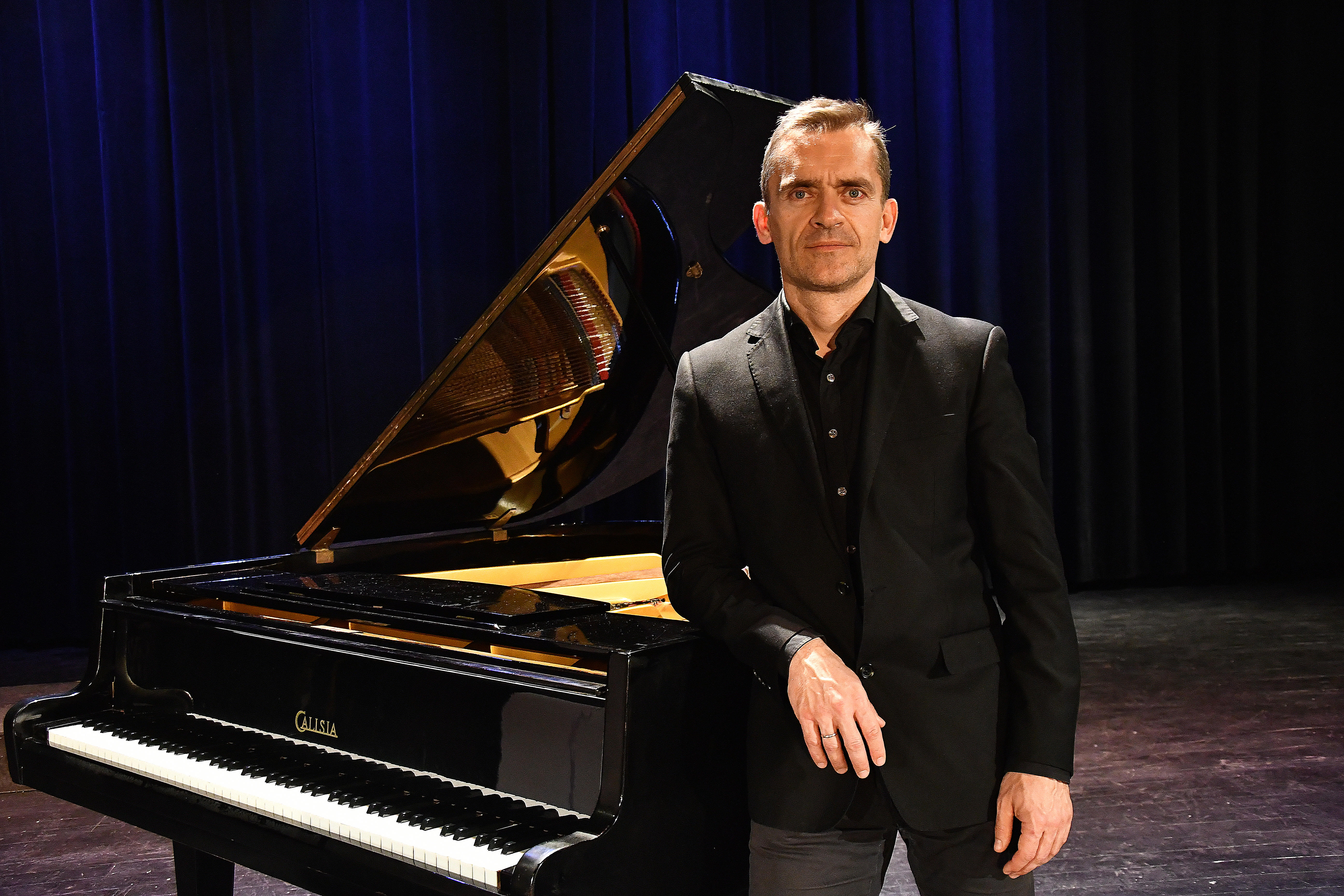 Adam Niedzielin - photo